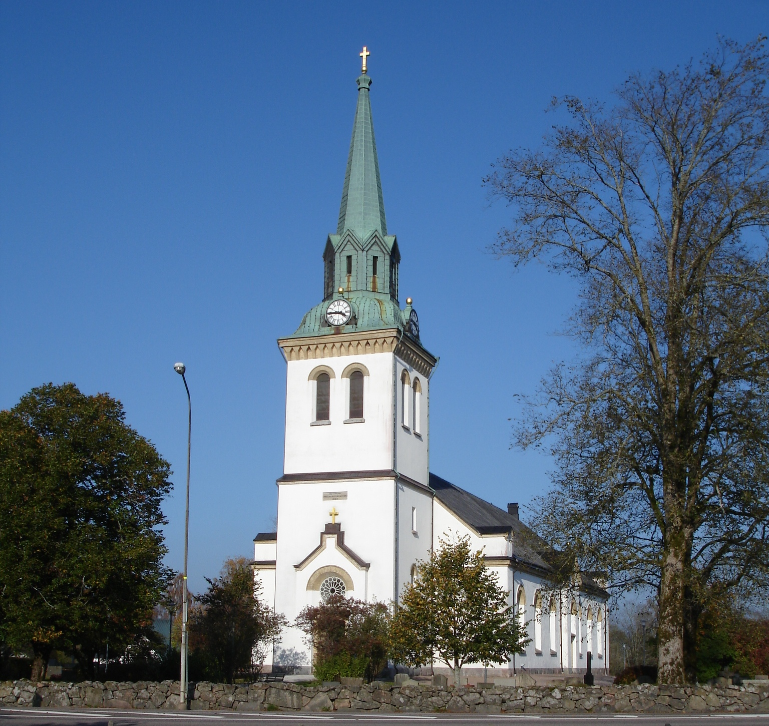 Torups kyrka, Hallands län, Göteborgs stift